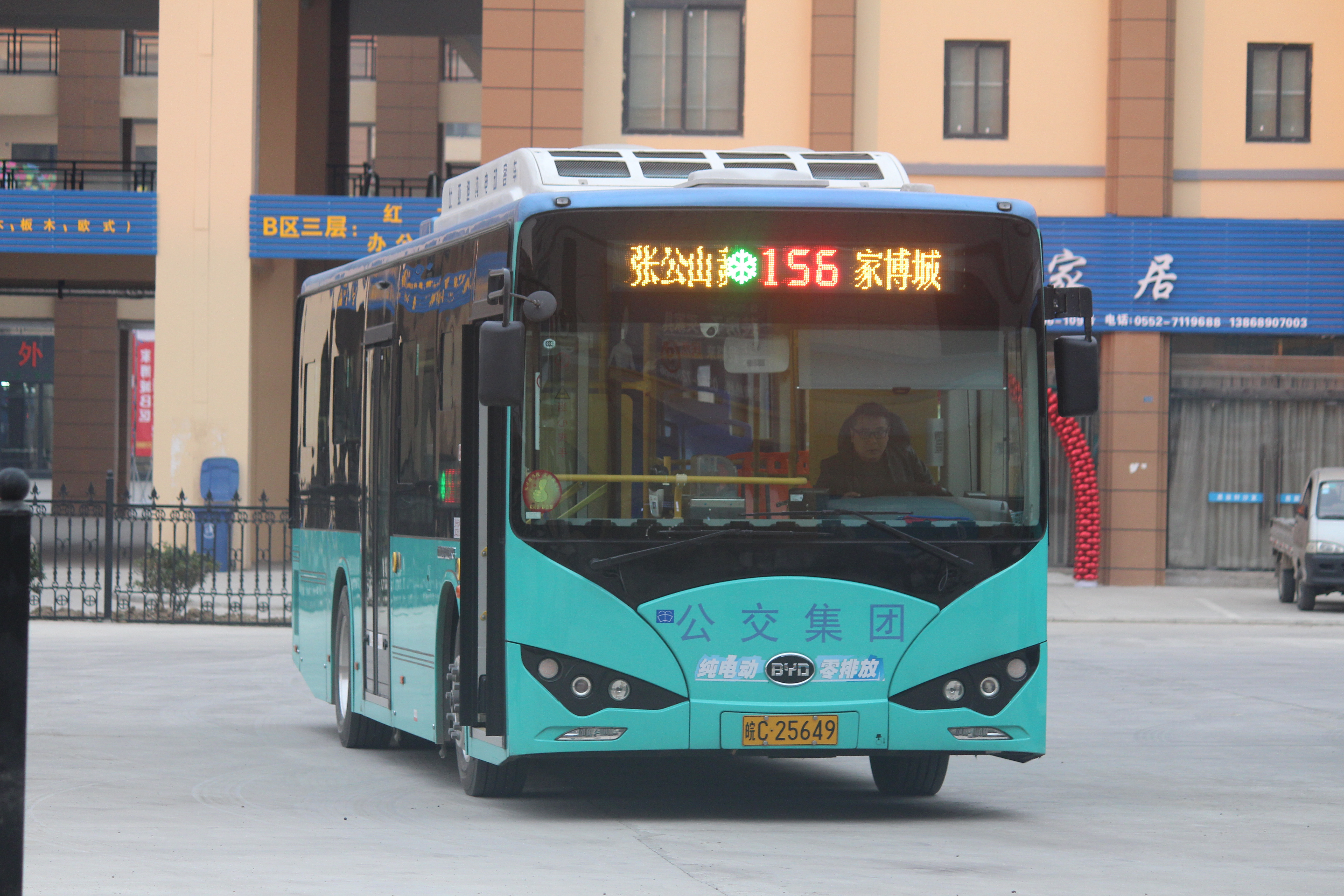 中文（中国大陆）: Bengbu Bus No.156 in Jiabocheng Sta.